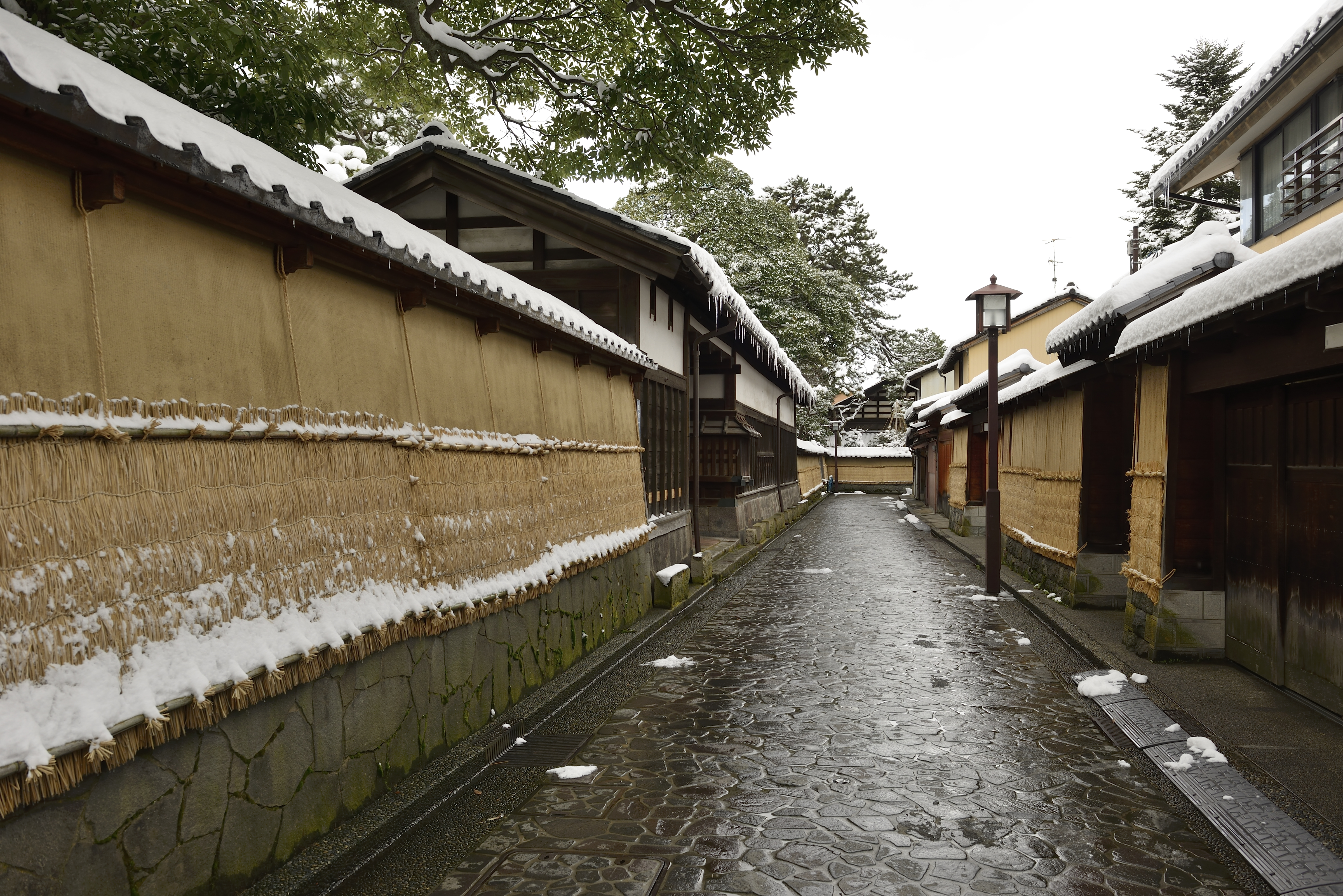 長町武家屋敷跡